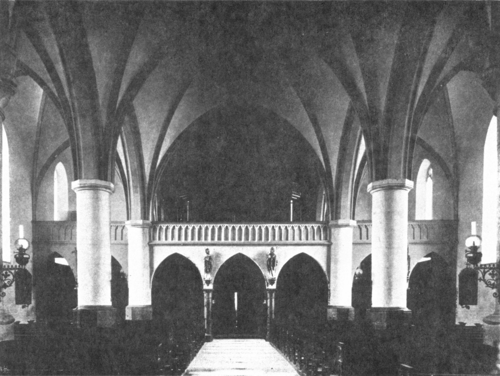 Innen-Ansicht der St.-Peter-Kirche, Waltrop, 1897